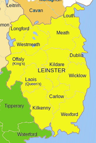 Leinster map